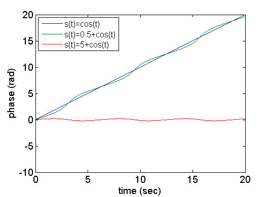 中文（台灣）: 瞬時相位